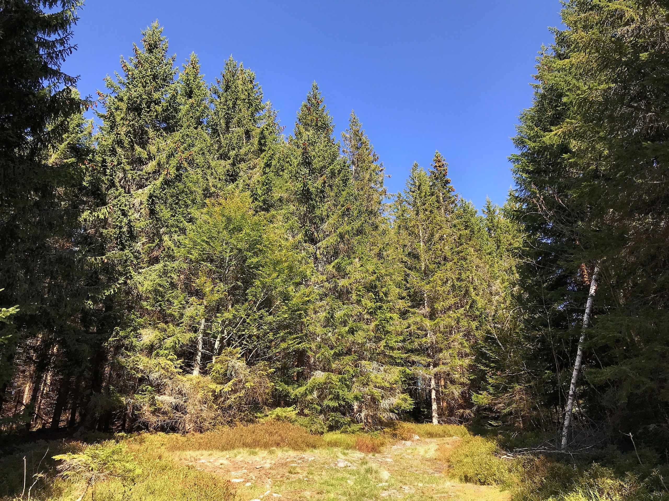 Hůrecký vrch (1099 m) na Šumavě